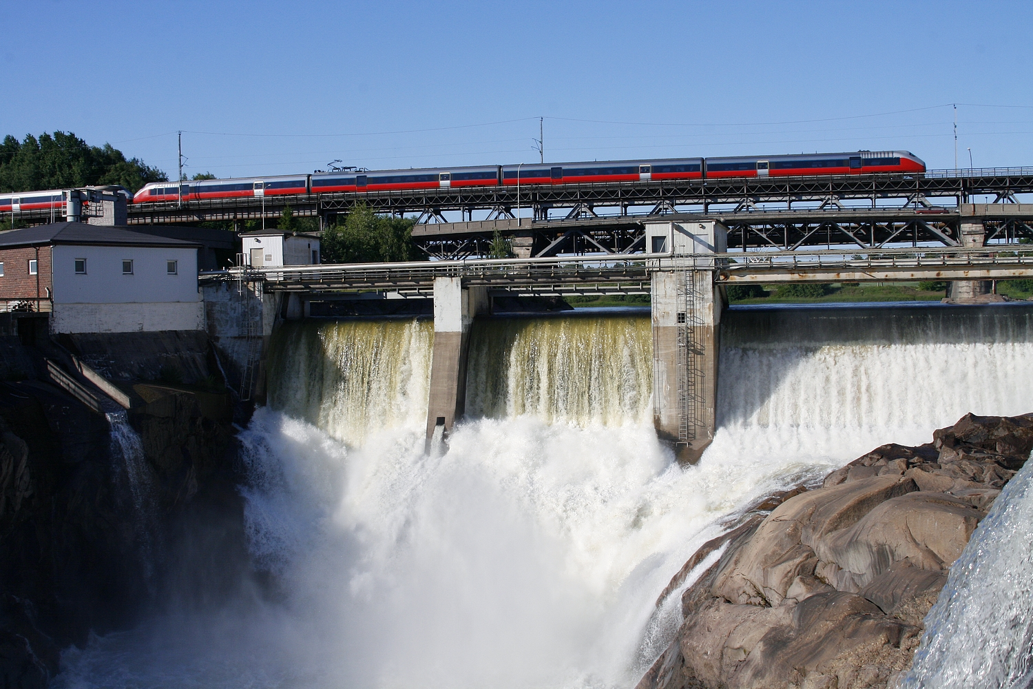 Tog på brua over Sarpsfossen